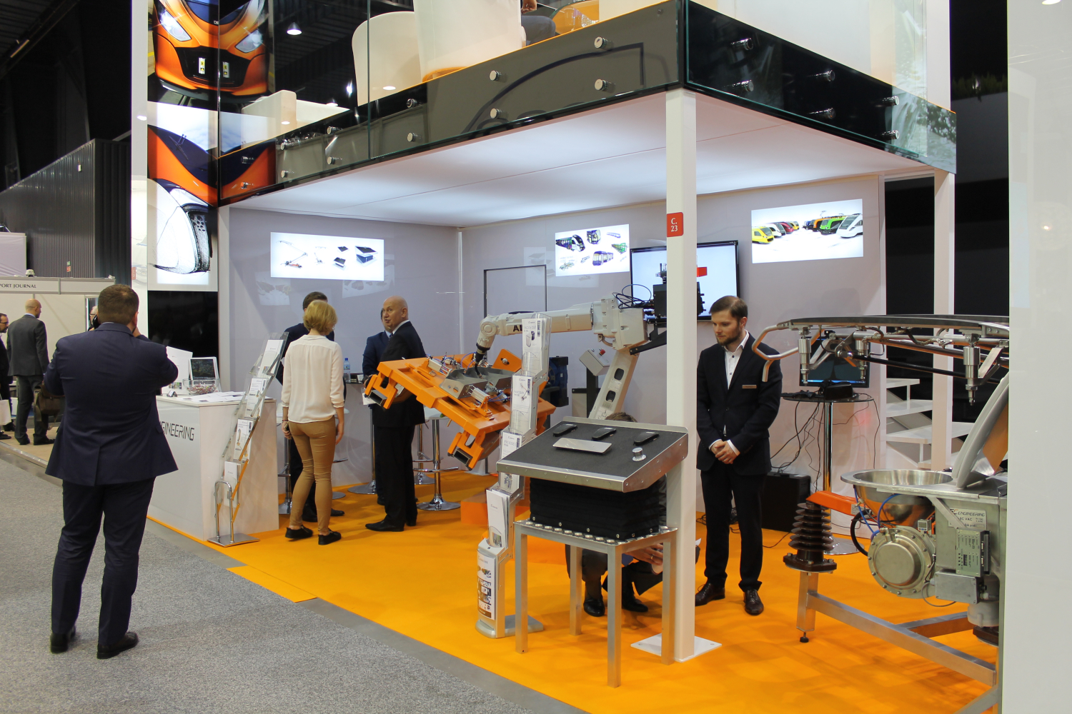 Stoisko EC Engineering podczas targów Trako 2015. The making of this document was supported by Wikimedia Polska Association, within Wikigrant no. WG 2015-34. English | polski | +/−